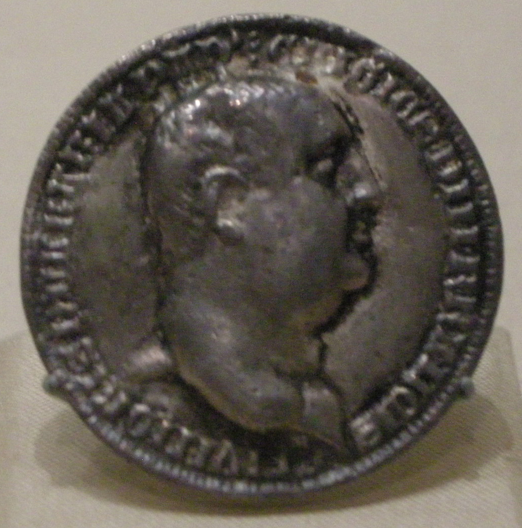 Medaglia d'argento di Francesco II da Carrara (1359-1406), 1390